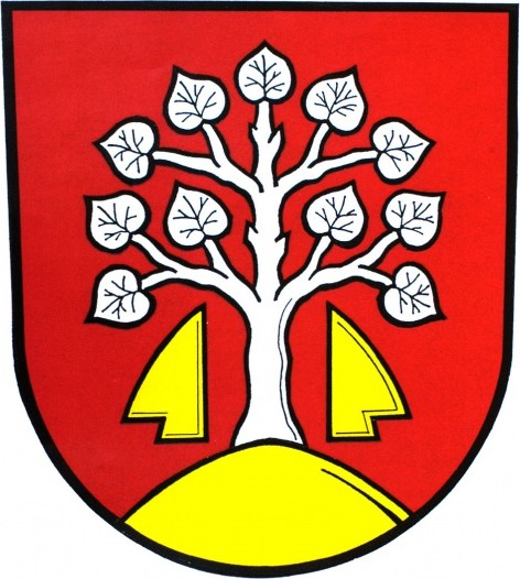 Znak obce Horní Lhota v okrese Ostrava-město.